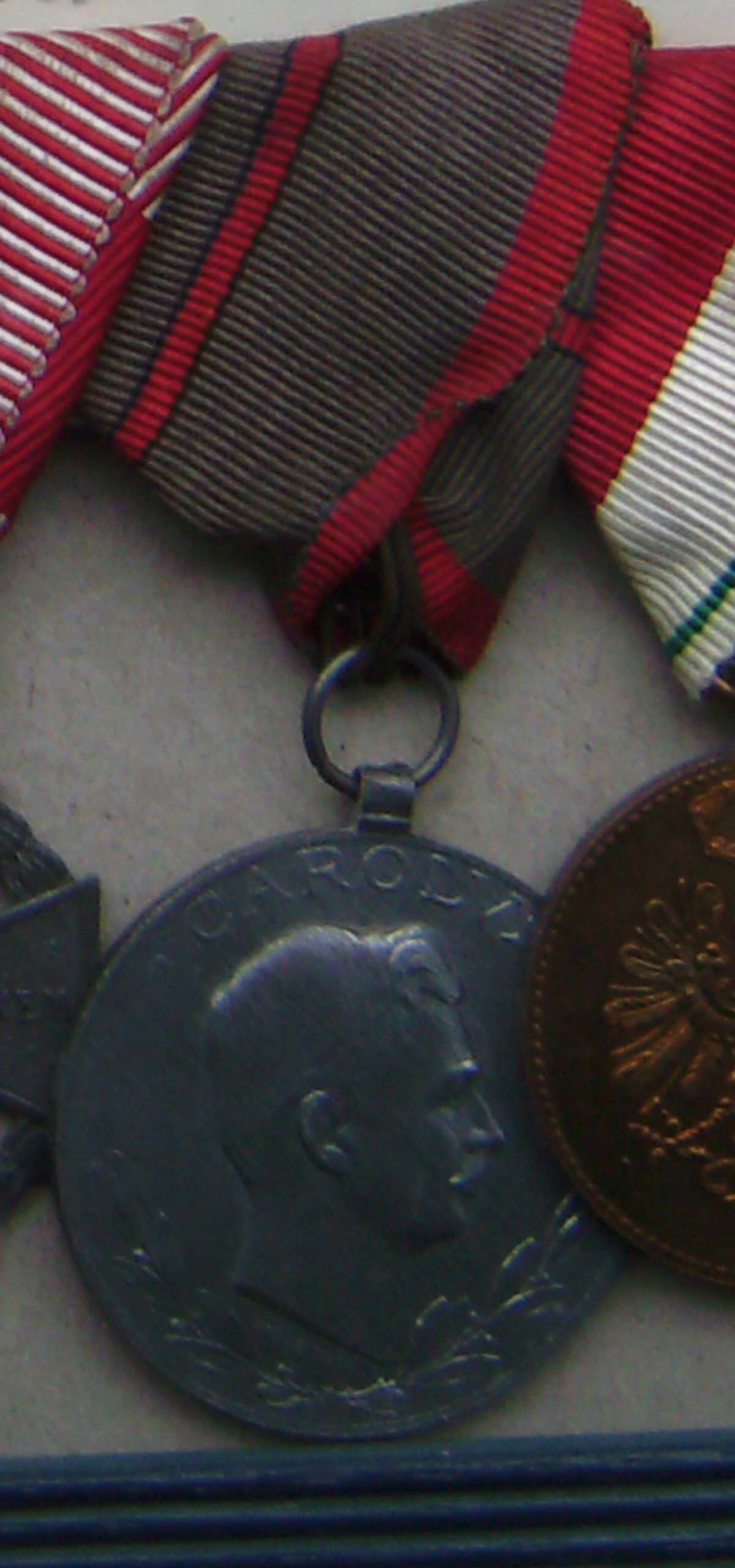 k.u.k. Verwundetenabzeichen bzw. Blessiertenmedaille